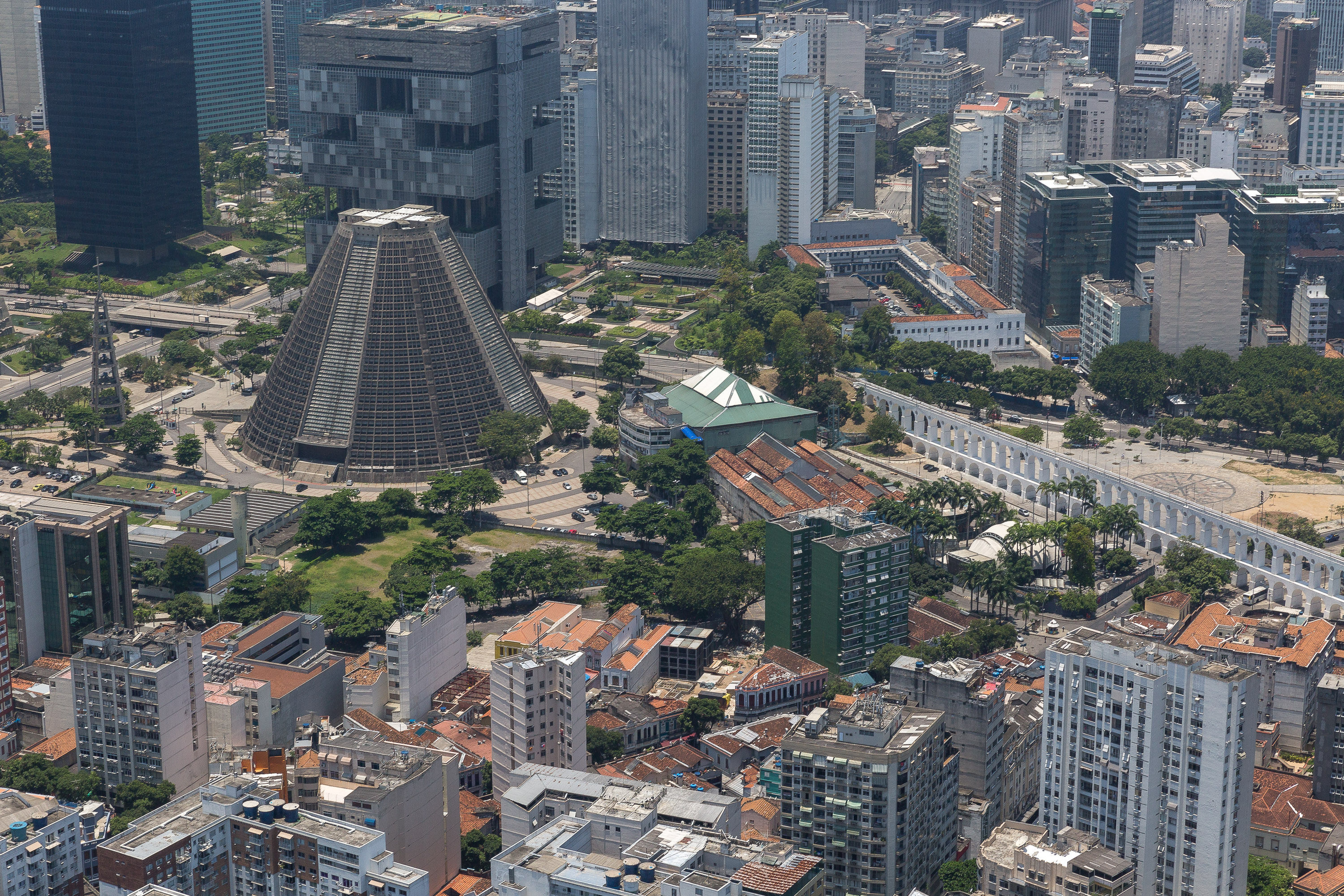 Vista aérea do centro do Rio de Janeiro, Catedral Metropolitana, Arcos da Lapa, prédio da Petrobras.